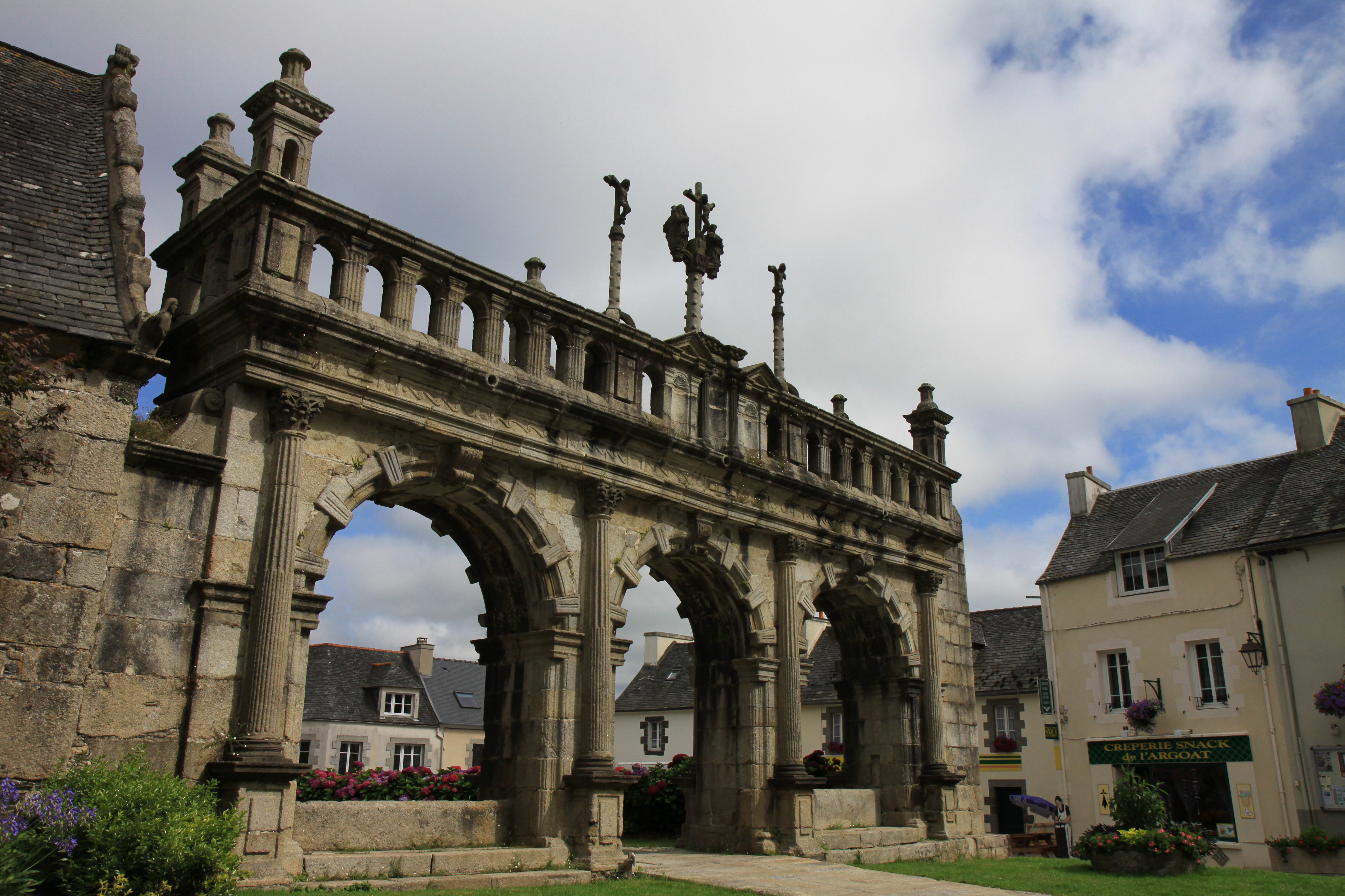 L'Arc de Triomphe de l'enclos paroissial de Sizun, Finistère. .